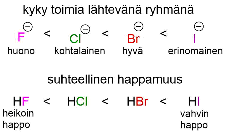 Halogenidianionien kyky toimia lähtevänä ryhmänä korreloi sen kanssa, miten anioni stabiloi negatiivista varausta. Hyvä lähtevä ryhmä on vahva hapon konjugaattiemäs.